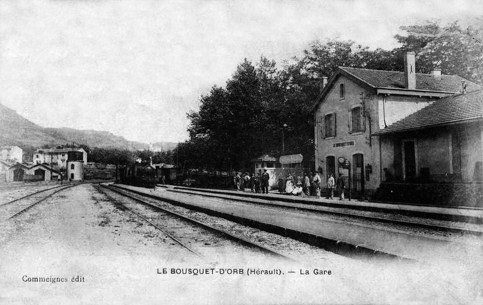 L'intérieur de la gare du Bousquet-d'Orb, avec le bâtiment voyageurs et en arrière plan une remise à locomotives et un château d'eau.